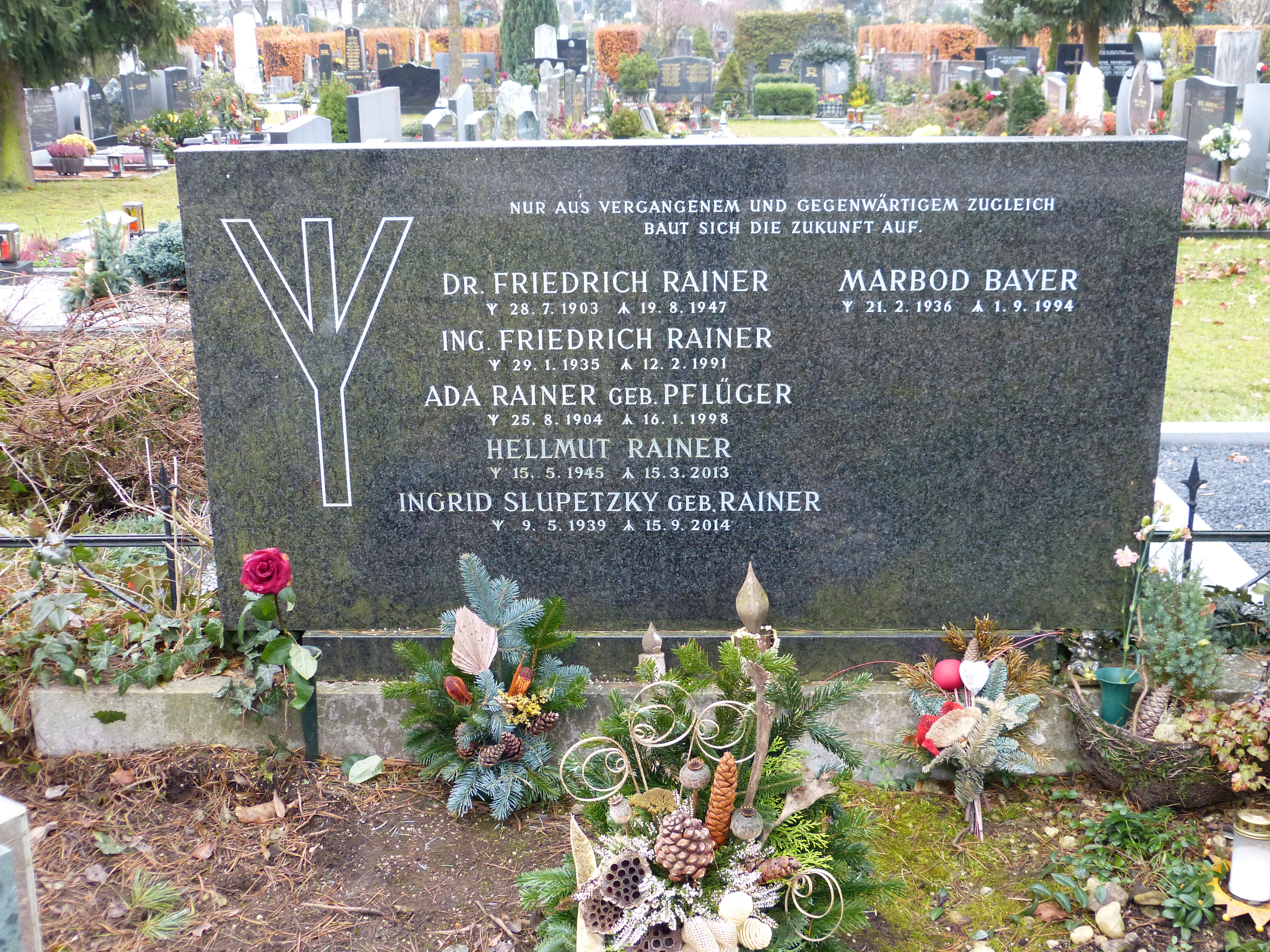 Friedhof Klagenfurt-Annabichl: Lebensrune und Todesrune auf modernem Grabstein. Inschrift: "Nur aus vergangenem und Gegenwärtigem zugleich baut sich die Zukunft auf" (Adolf Hitler, 1933). Erinnert wird an Gauleiter Friedrich Rainer.